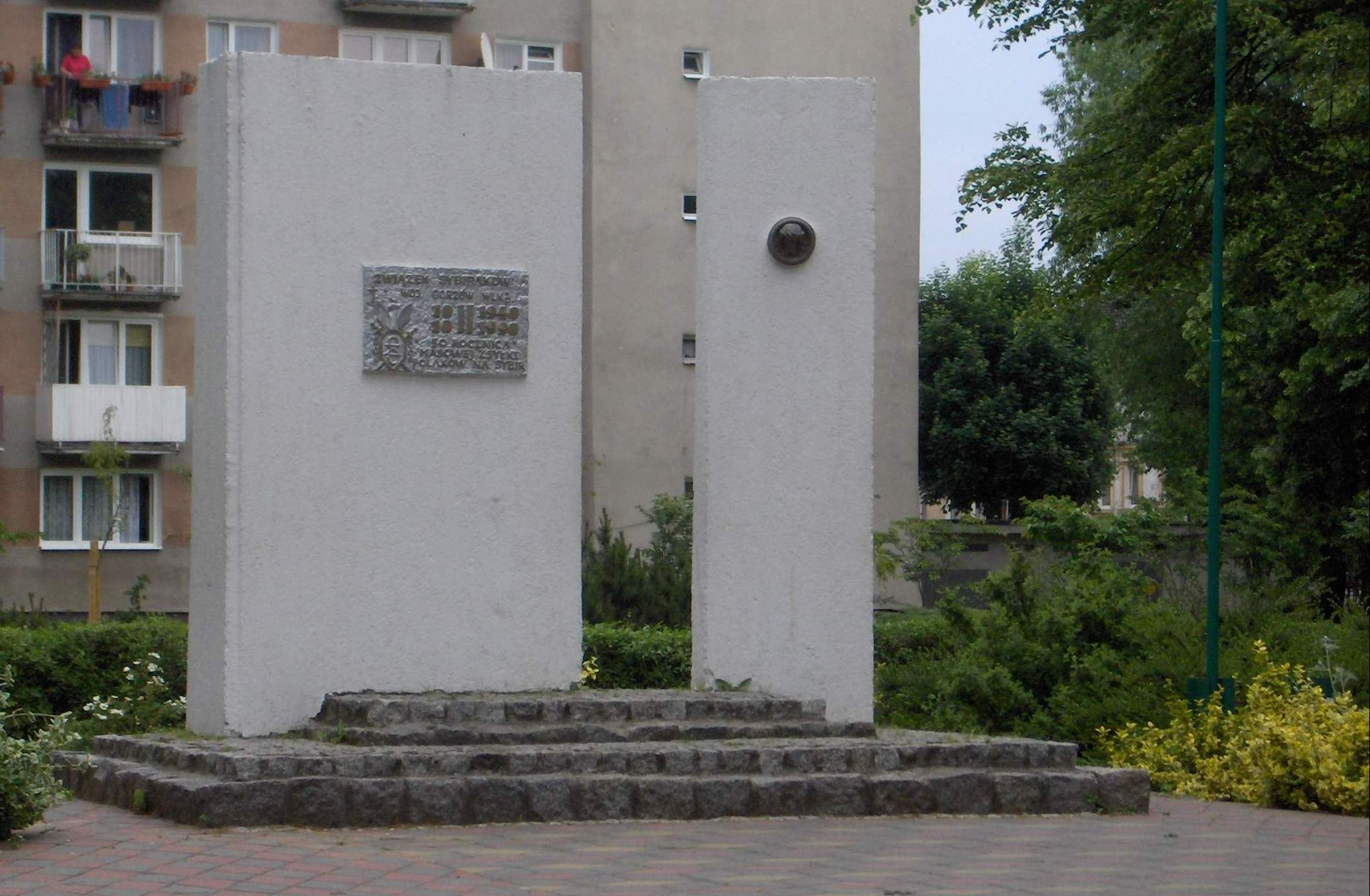 Polski Pomnik Sybiraków w Słubicach #1